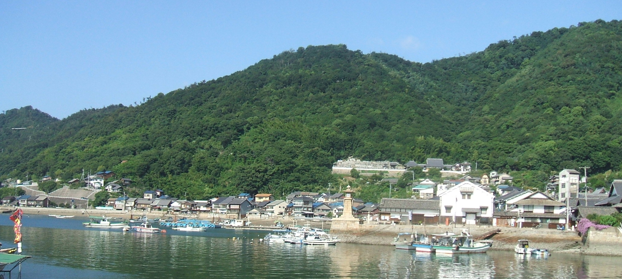 の架橋建設予定地の現状。右にあるのは「いろは丸展示館」と常夜灯